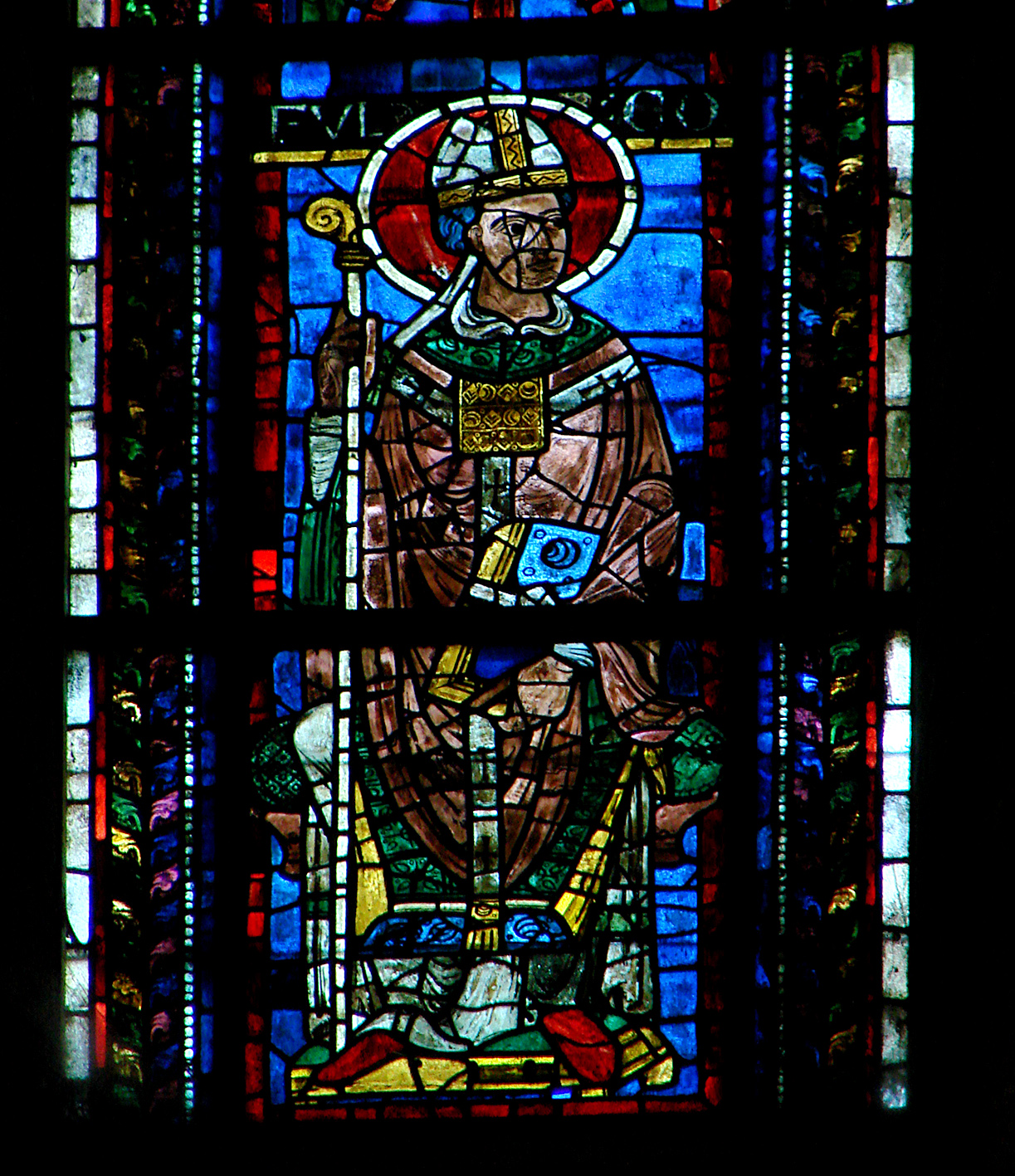 Foulques le vénérable, archevêque de Reims (882-900), vitrail du 12ème siècle. Basilique Saint-Remi à Reims.